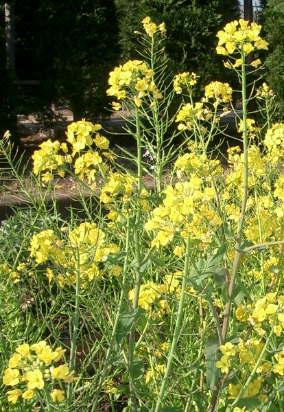 Brassica rapa var. nippo-oleifera。アブラナ